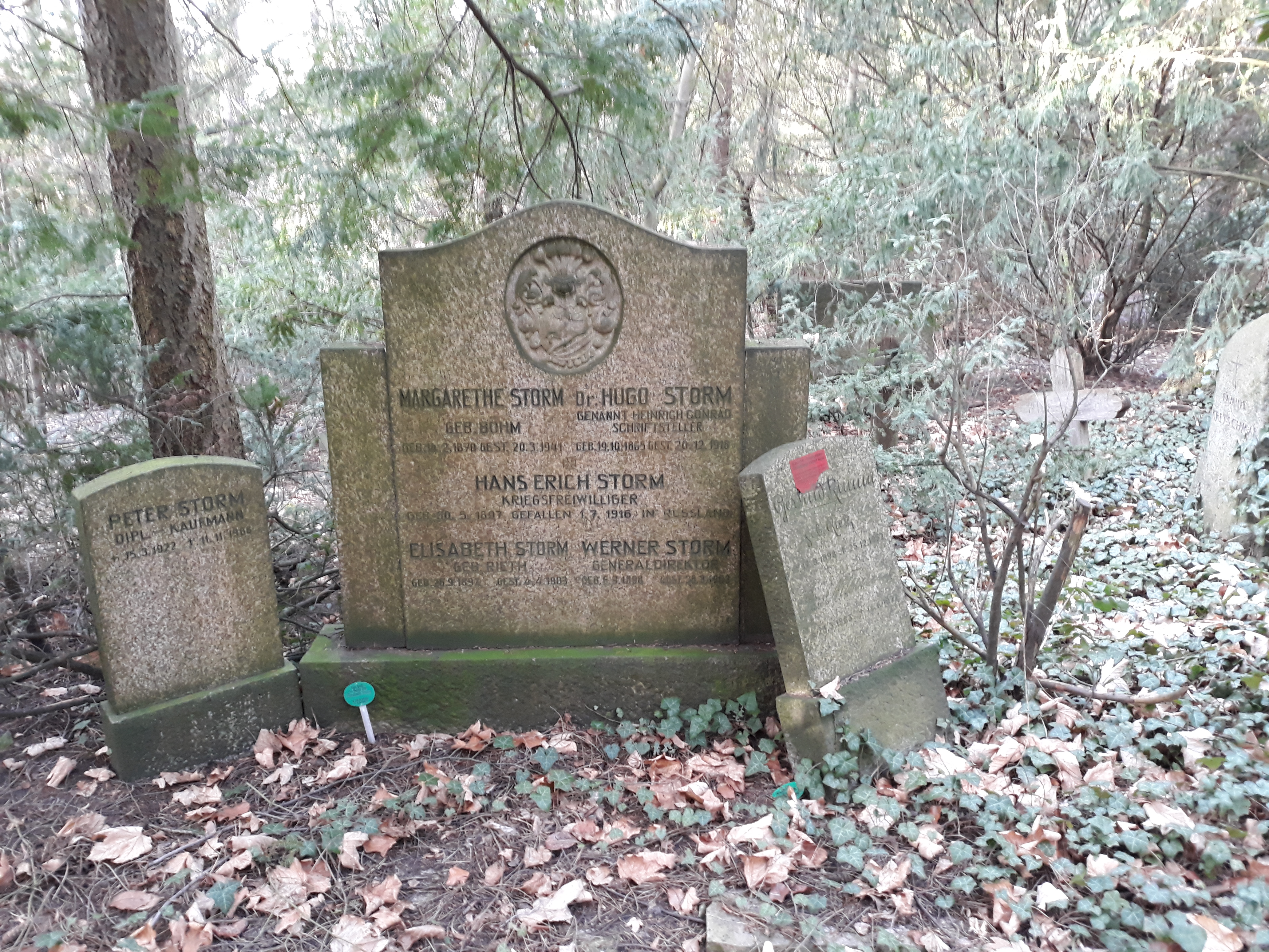 Das Grab des deutschen Schriftstellers und Übersetzers Heinrich Conrad (eigentlich Hugo Storm) im Familiengrab auf dem Parkfriedhof Lichterfelde in Berlin.